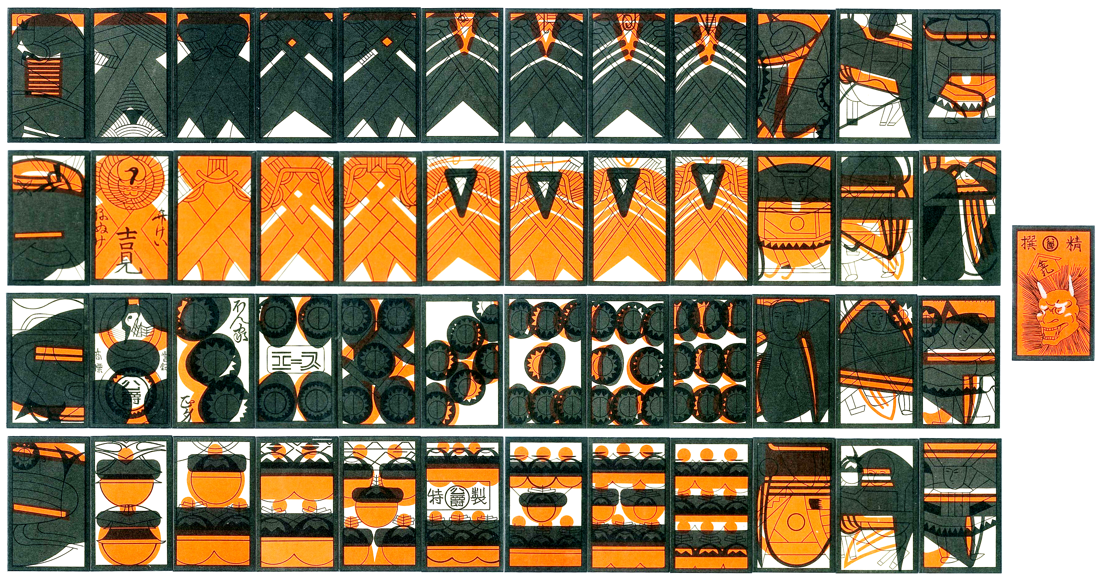 中文（台灣）: 黒札的牌具